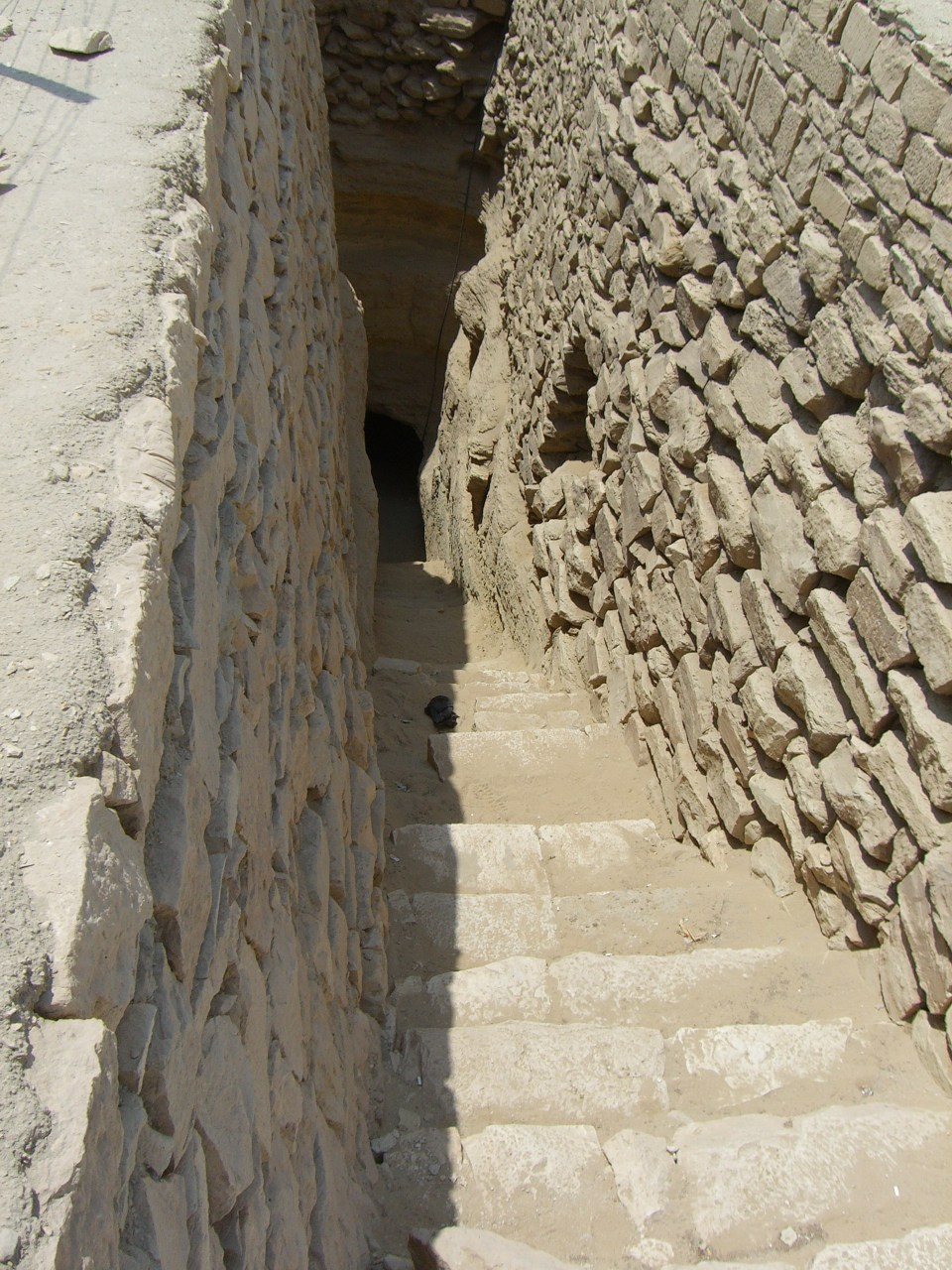 Accès aux galeries souterraines de la pyramide de Djéser - Saqqarah - IIIe dynastie égyptienne